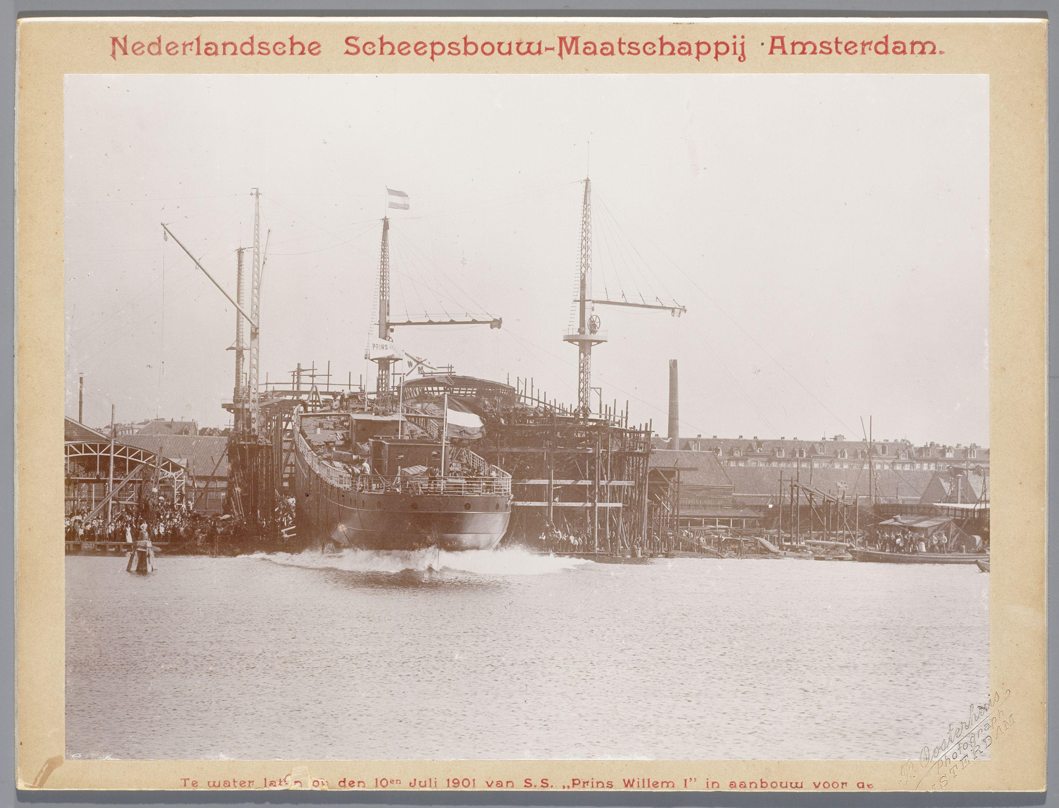 Beschrijving De tewaterlating van het vrachtpassagiersschip ss. Prins Willem I Bouwnummer 39, gebouwd op de werf van de Nederlandsche Scheepsbouw Maatschappij (NSM), Conradstraat 151, in opdracht van Koninklijke West Indische Maildienst. Het schip gezien vanaf de Dijksgracht. Documenttype foto Vervaardiger Oosterhuis, Gustaaf (1858-1938) Collectie Archief Nederlandse Dok- en Scheepsbouw Mij.: foto's Datering 10 juli 1901 Geografische naam Conradstraat Dijksgracht Inventarissen Afbeeldingsbestand 010179000004 Generated with Dememorixer